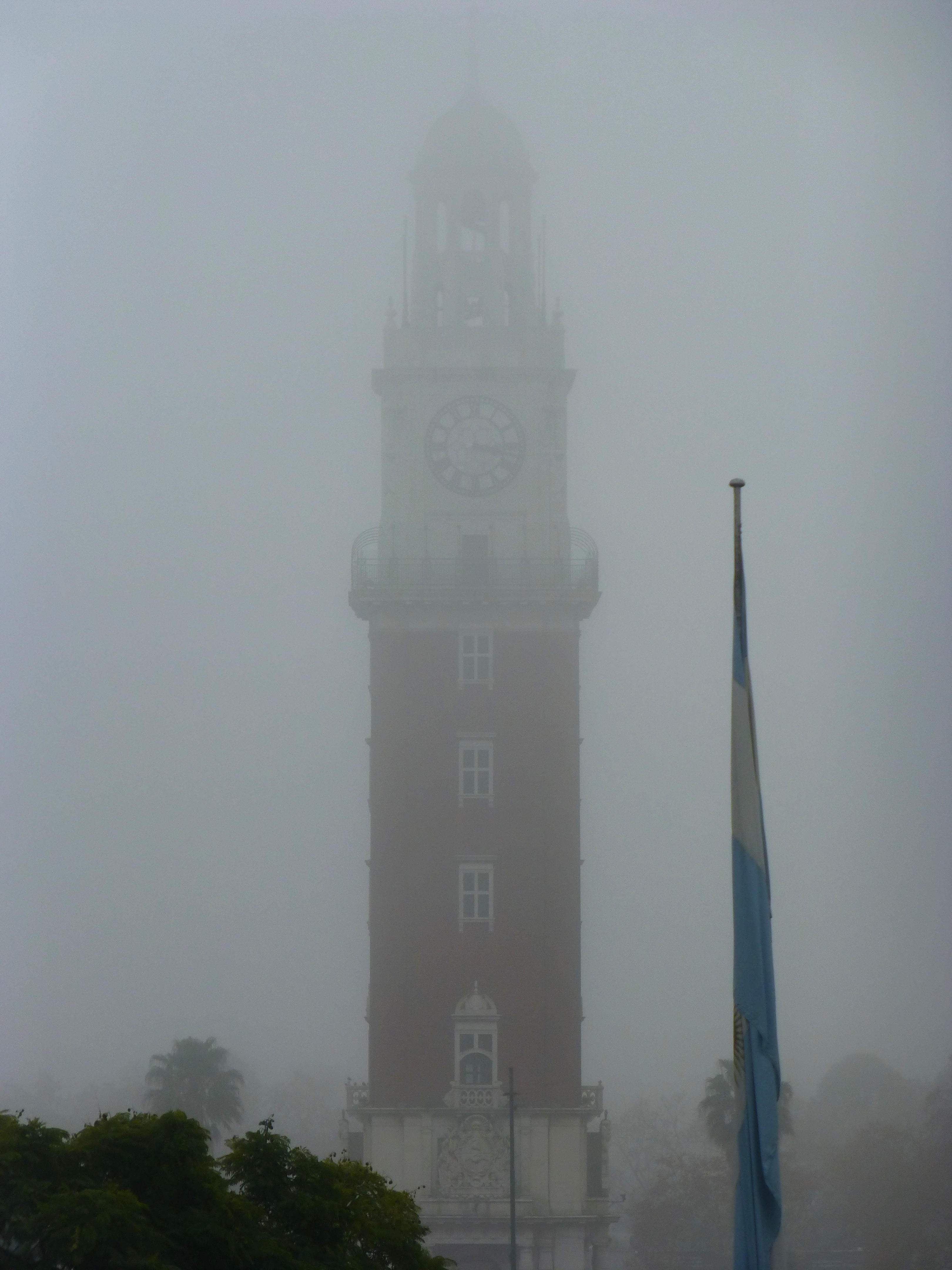 La Torre Monumental, más conocida como Torre de los Ingleses, ubicada en el barrio porteño de Retiro, durante una tarde neblinosa de invierno.